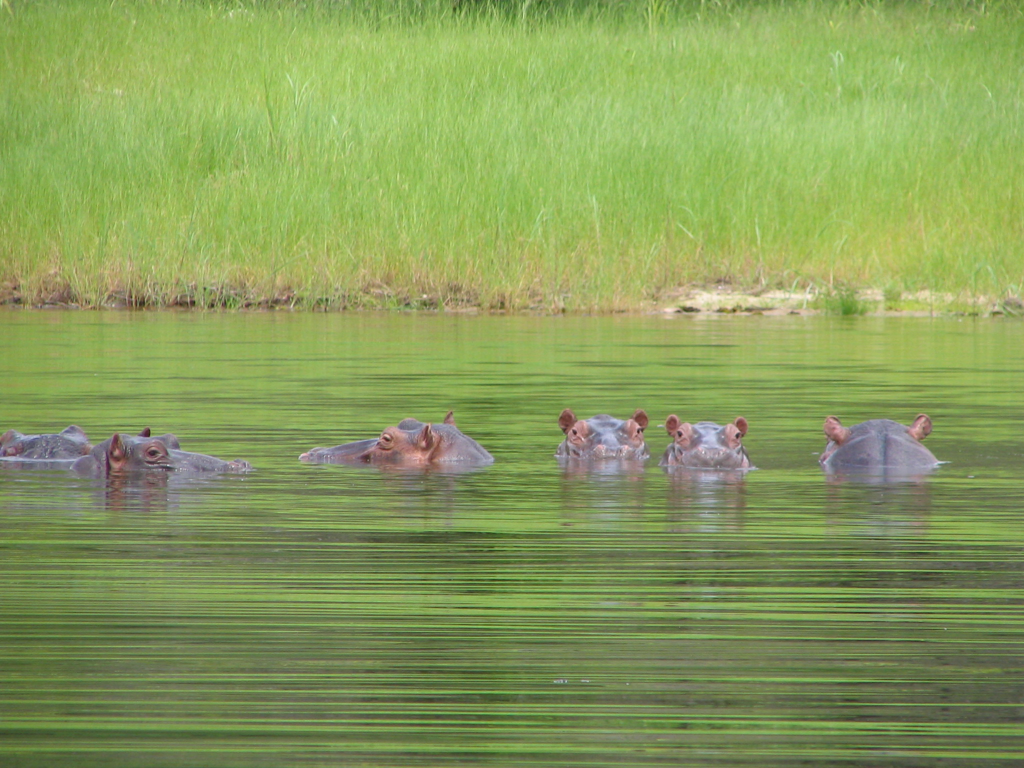 Hippos at Hippo Bay, Lake Cahora Bassa, Mozambique